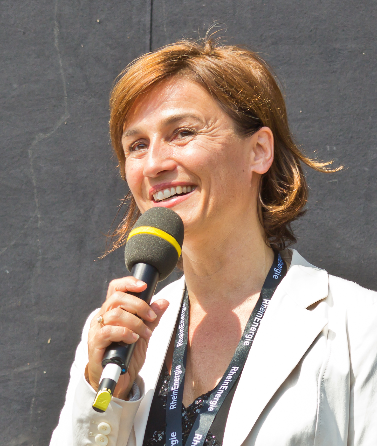 Birlikte - Kundgebung - Die Moderatoren stellen sich vor Foto: Sandra Maischberger